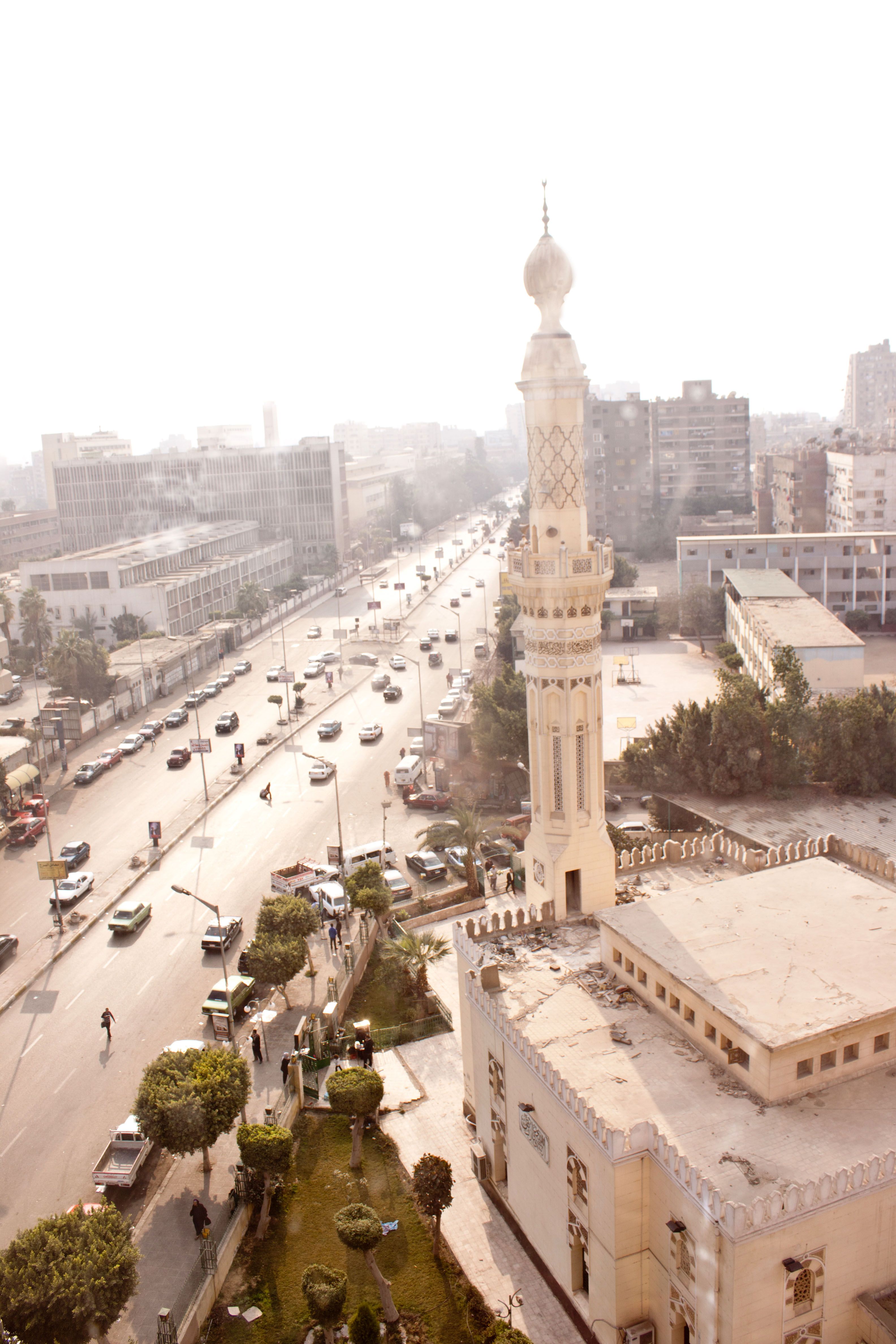 شارع التحرير - الدقي - القاهرة